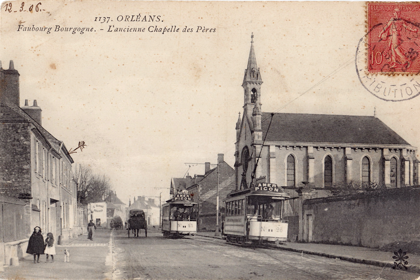 Carte postale ancienne sans mention d'éditeur, avec un logo M + feuille :ORLEANS - Faubourg Bourgogne - L'ancienne chapelle des Pères